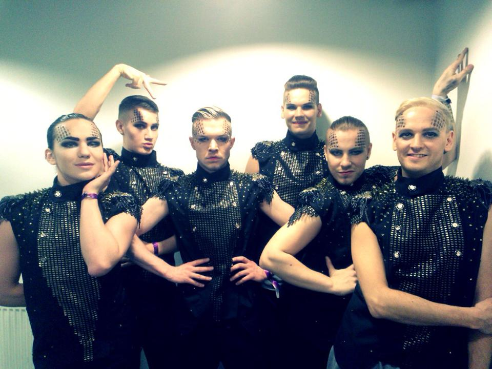 Tanssiryhmä Fe'Fellas Street SM 2014 -kisoissa.